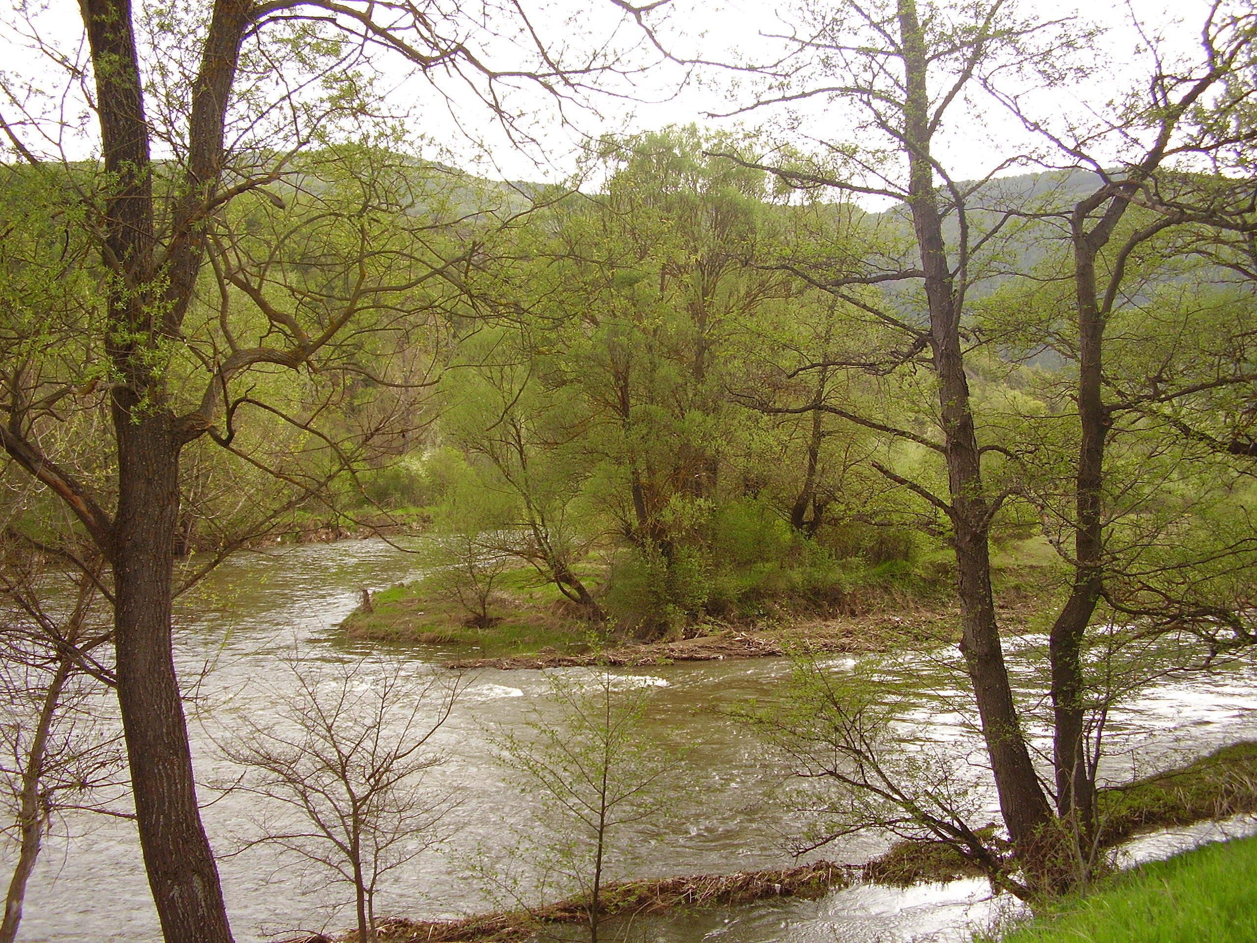 Изглед от с.Пастух